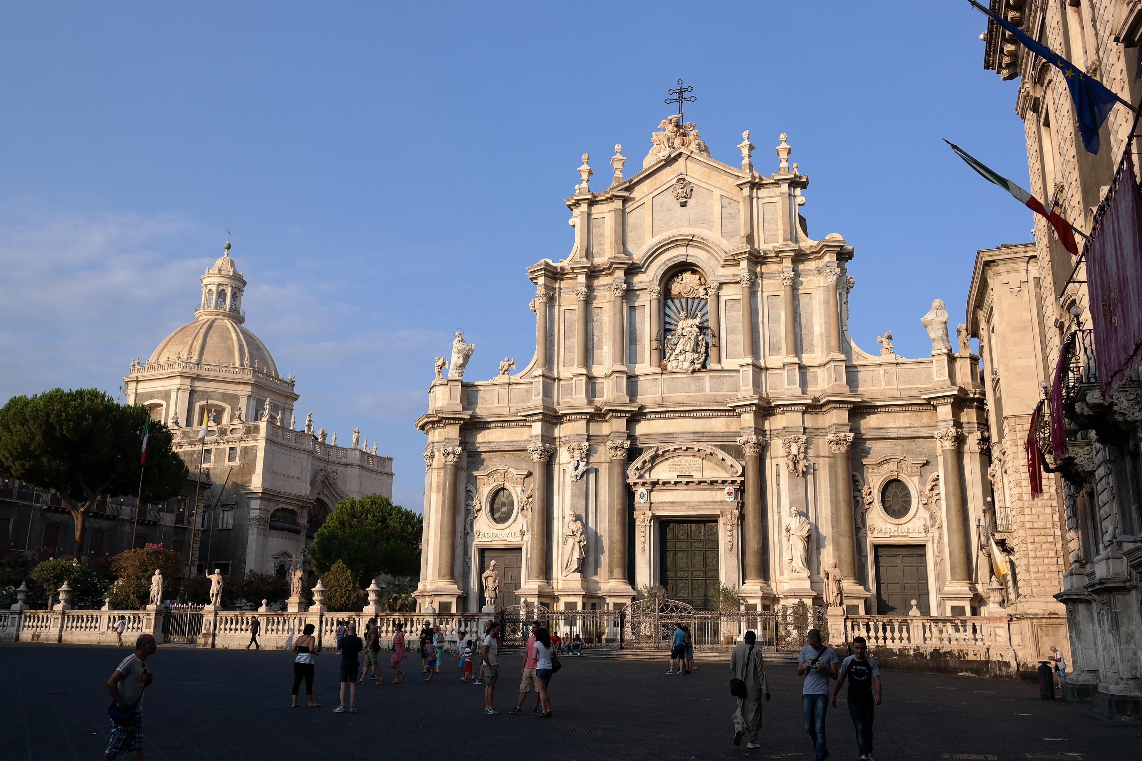 Piazza del Duomo a Catania, al tramonto